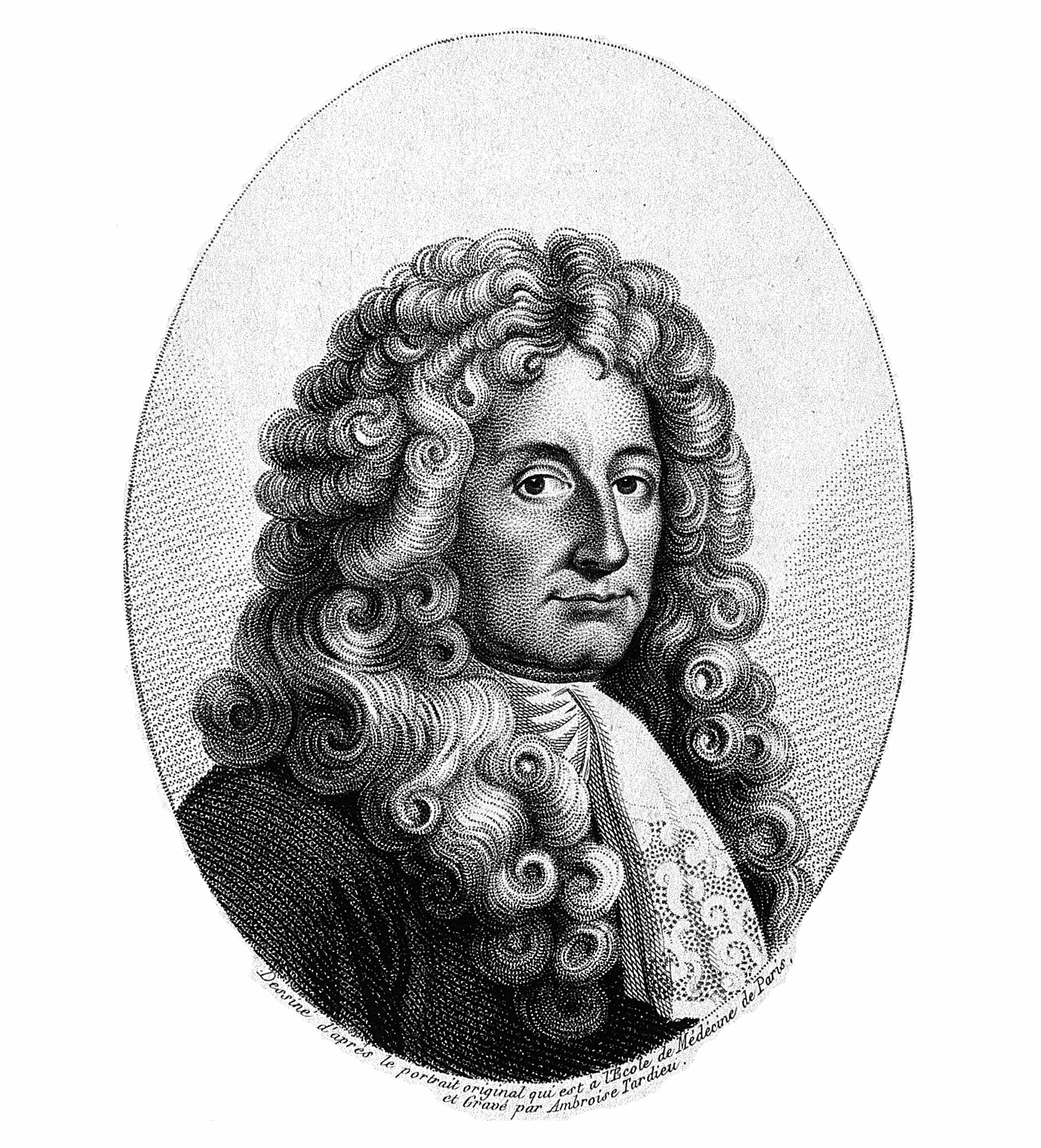 François Mauriceau. Stipple engraving by A. Tardieu after Bolougne, senior. Iconographic Collections Keywords: portrait prints; stipple prints; Francois Mauriceau